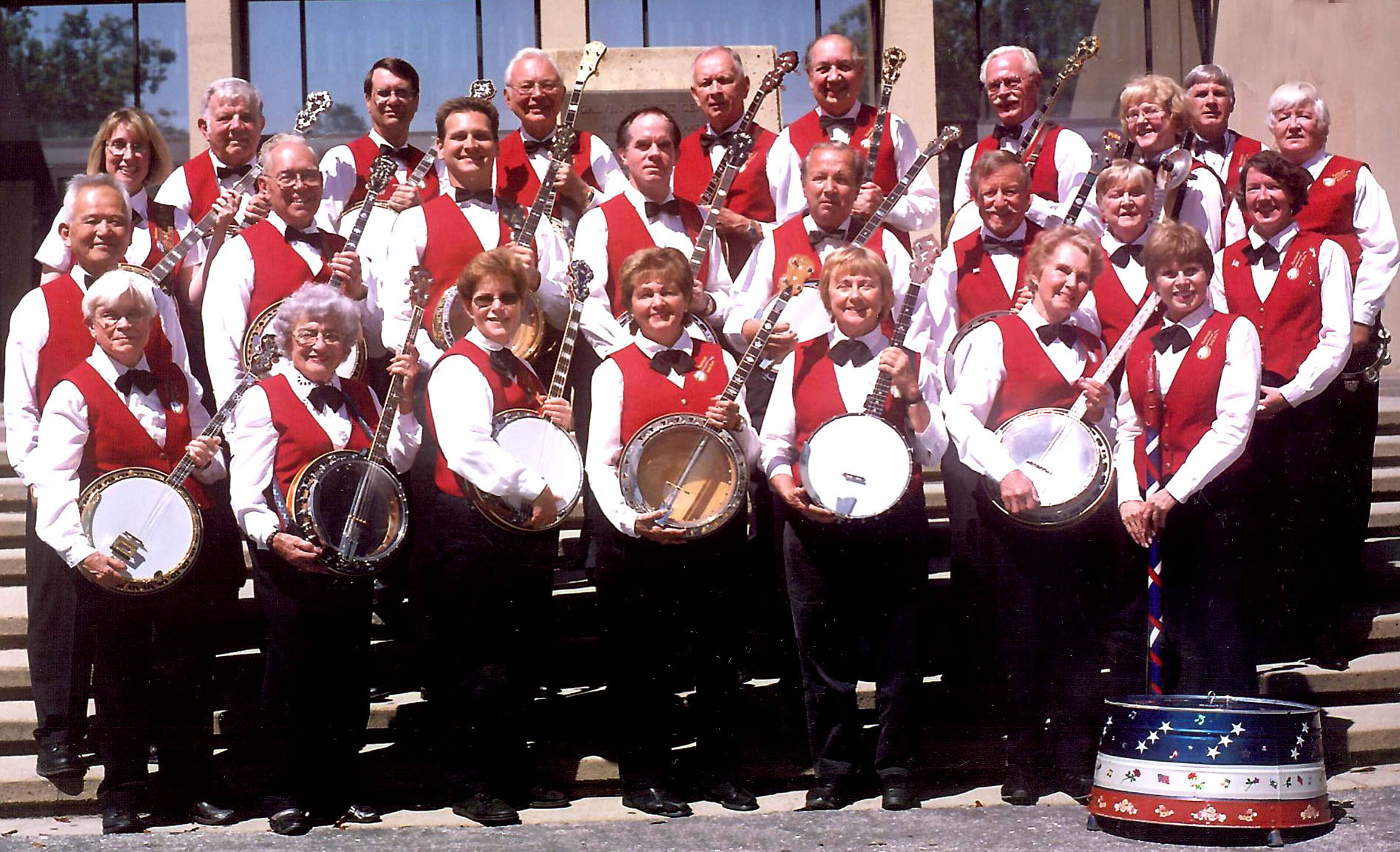 Peninsula Banjo Band, circa 2003, Cupertino, California